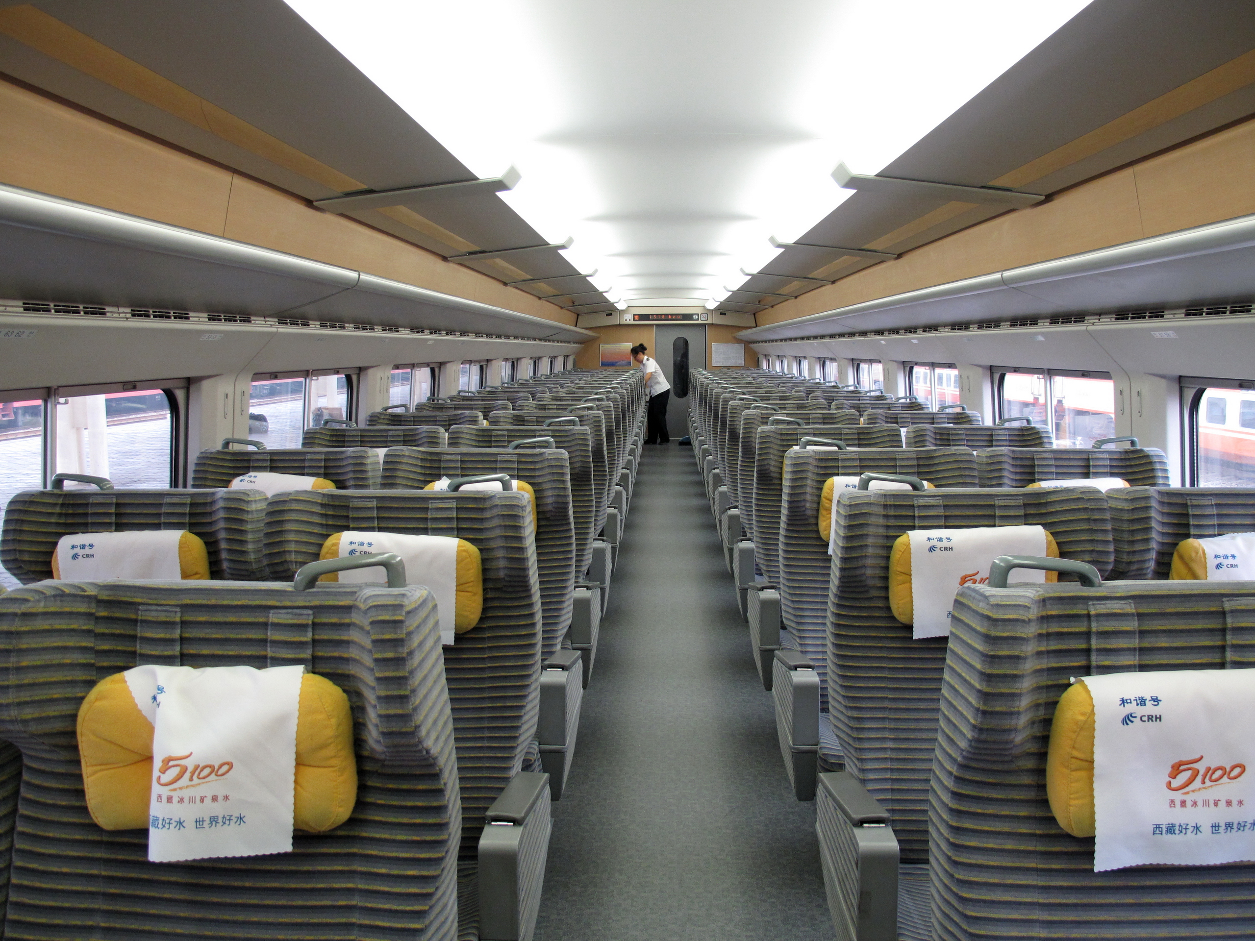 中文（中国大陆）: CRH2A 一等座车